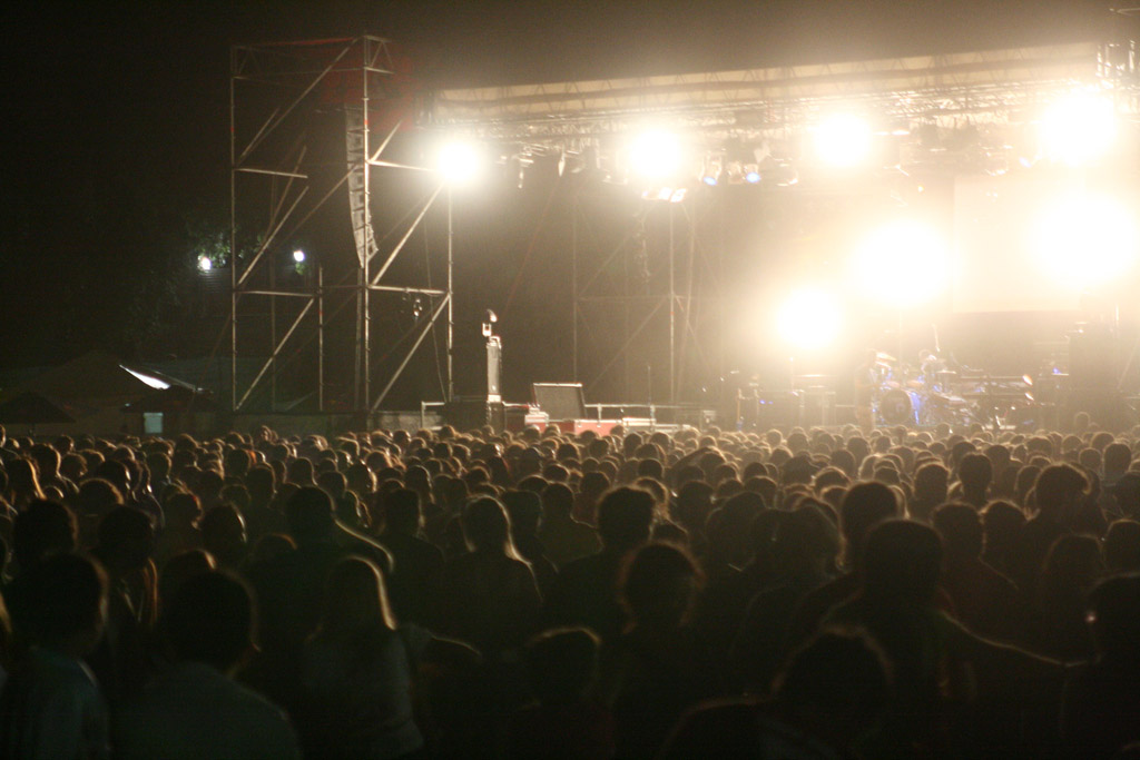 Pubblico a un concertoGFDL